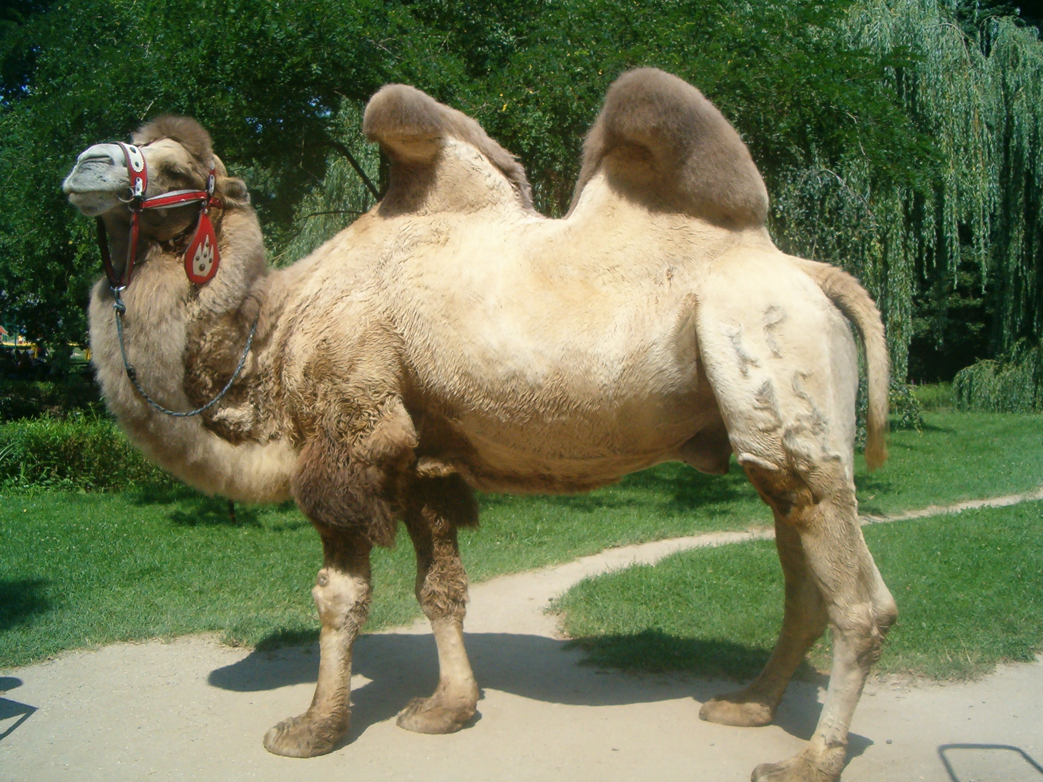 Camelus bactrianus